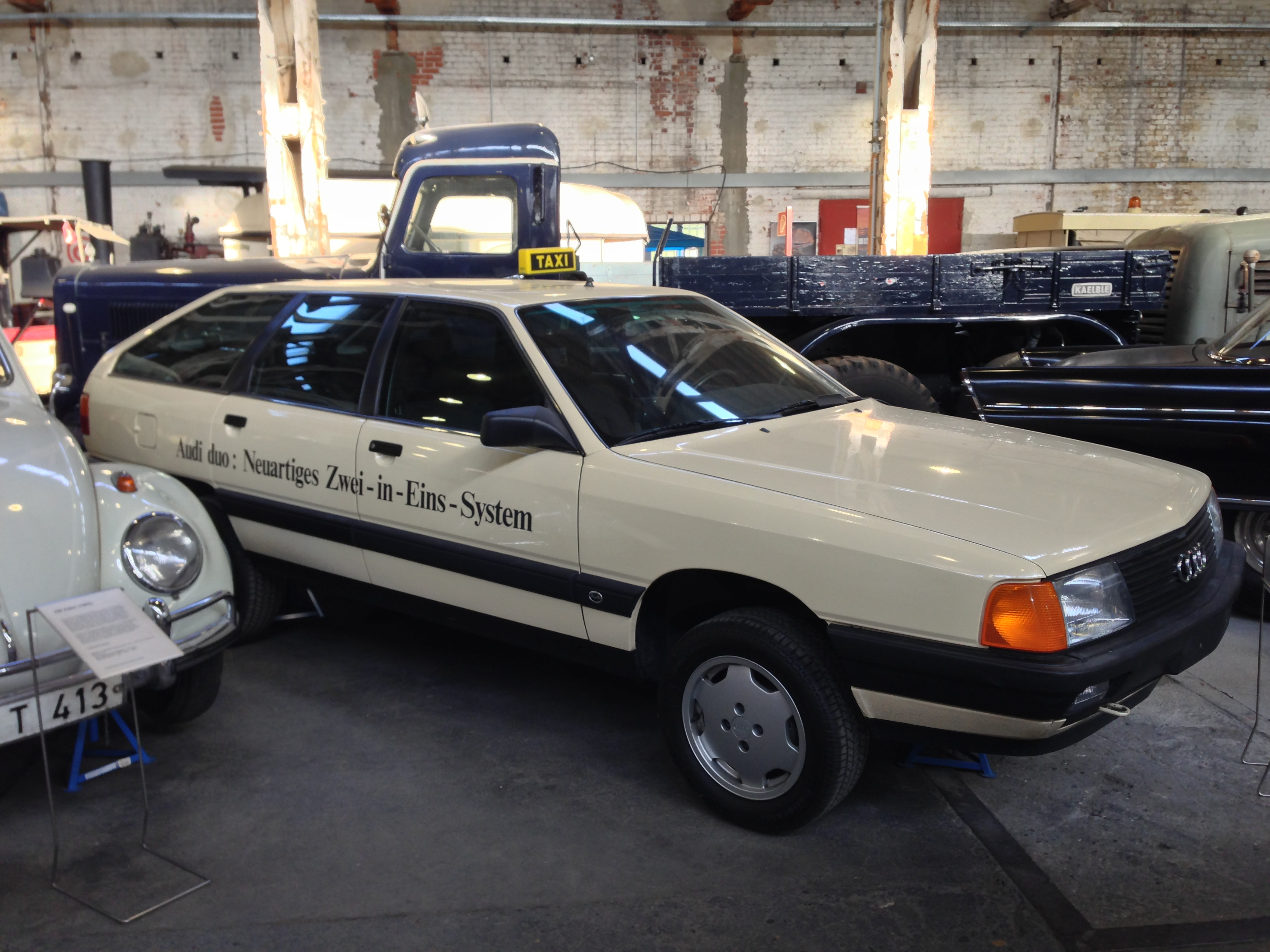 Depot des Deutschen Technikmuseums Berlin